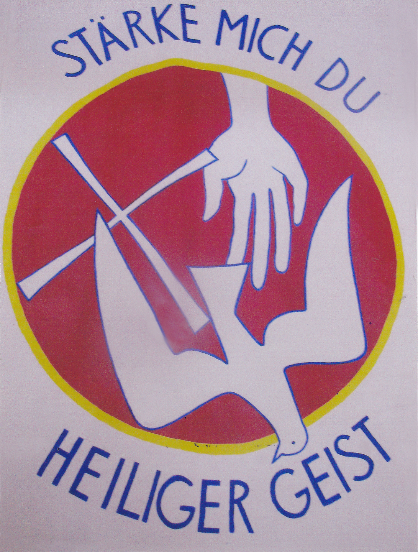 Gestaltung von Rosemarie Überegger in der römisch-katholischen Kirche Bruder Klaus Bäretswil